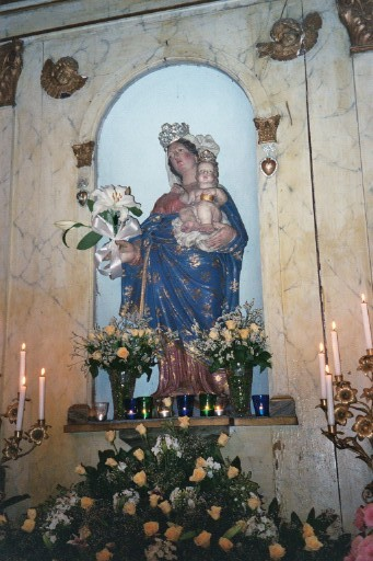 Vue de la statue de Notre-Dame de Grace de Crévéchamps prise par Catherine Froment 2006